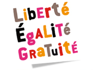 bus agglo à Aubagne